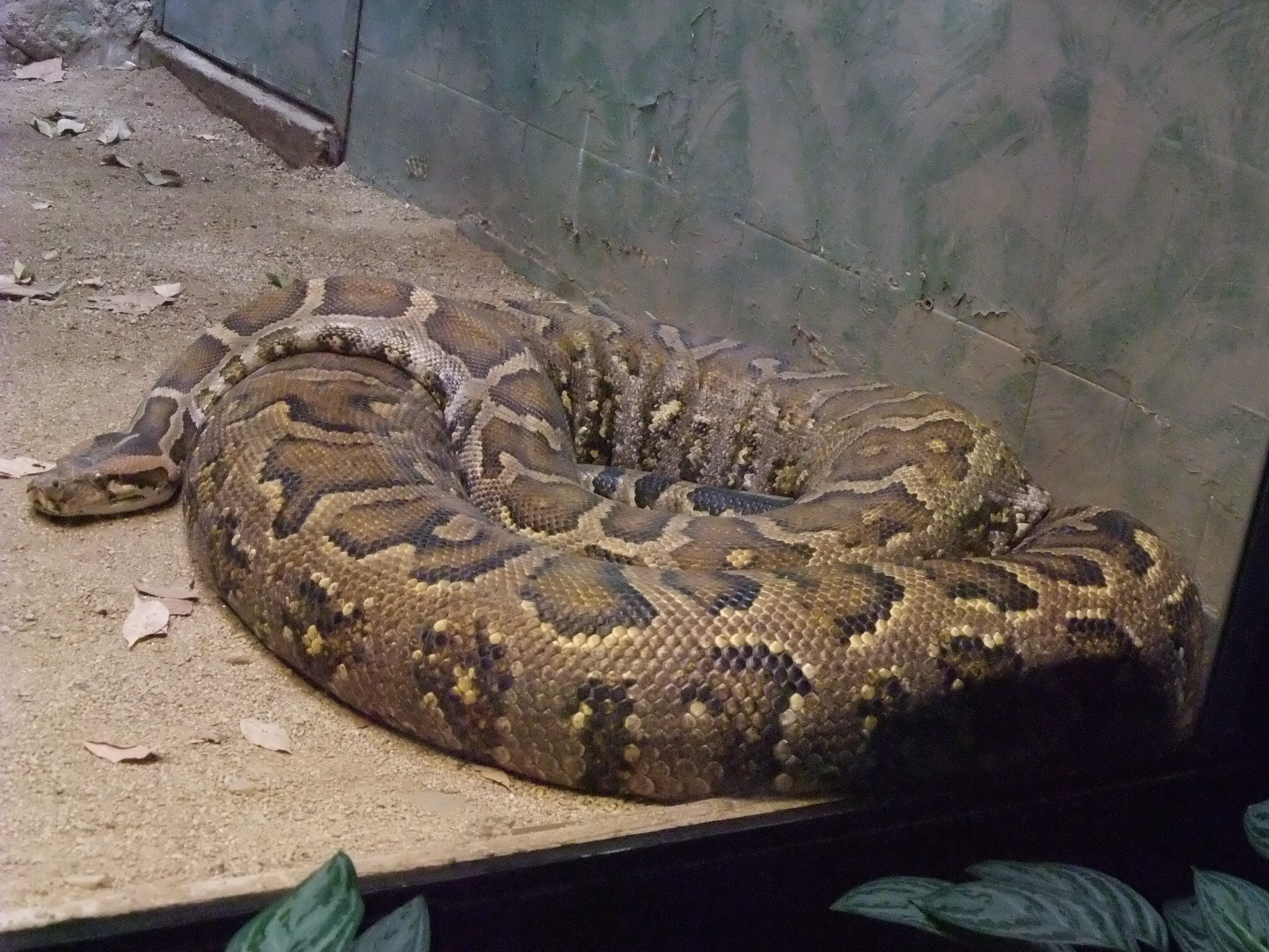 Barcelona-Zoo-Pitón de la India (Python molurus molurus)